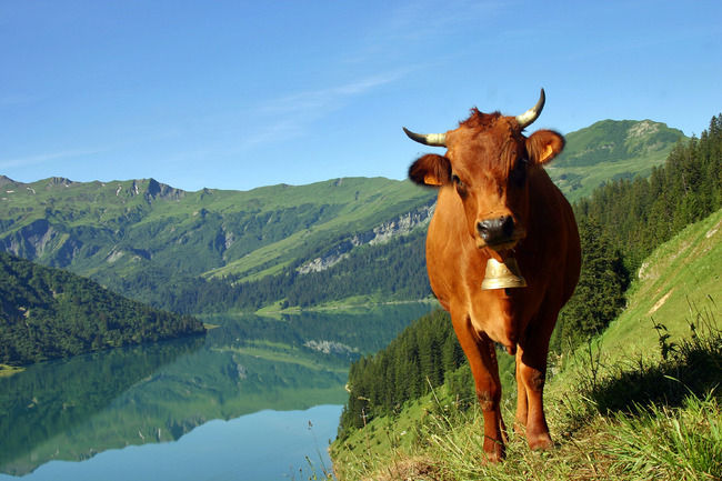 Photo vache tarine